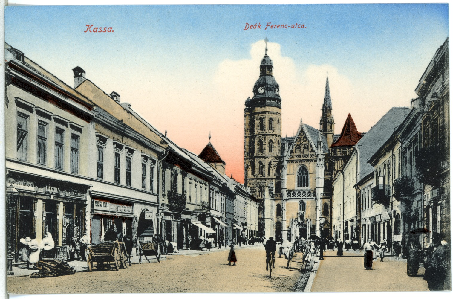 Kassa; Deak Ferenc - utca This postcard is from publisher Brück & Sohn in Meißen ( postcard has a unique number 14662 and is available in a higher resolution at the publisher. This images was uploaded in a cooperation project between Wikipedians and the publisher.